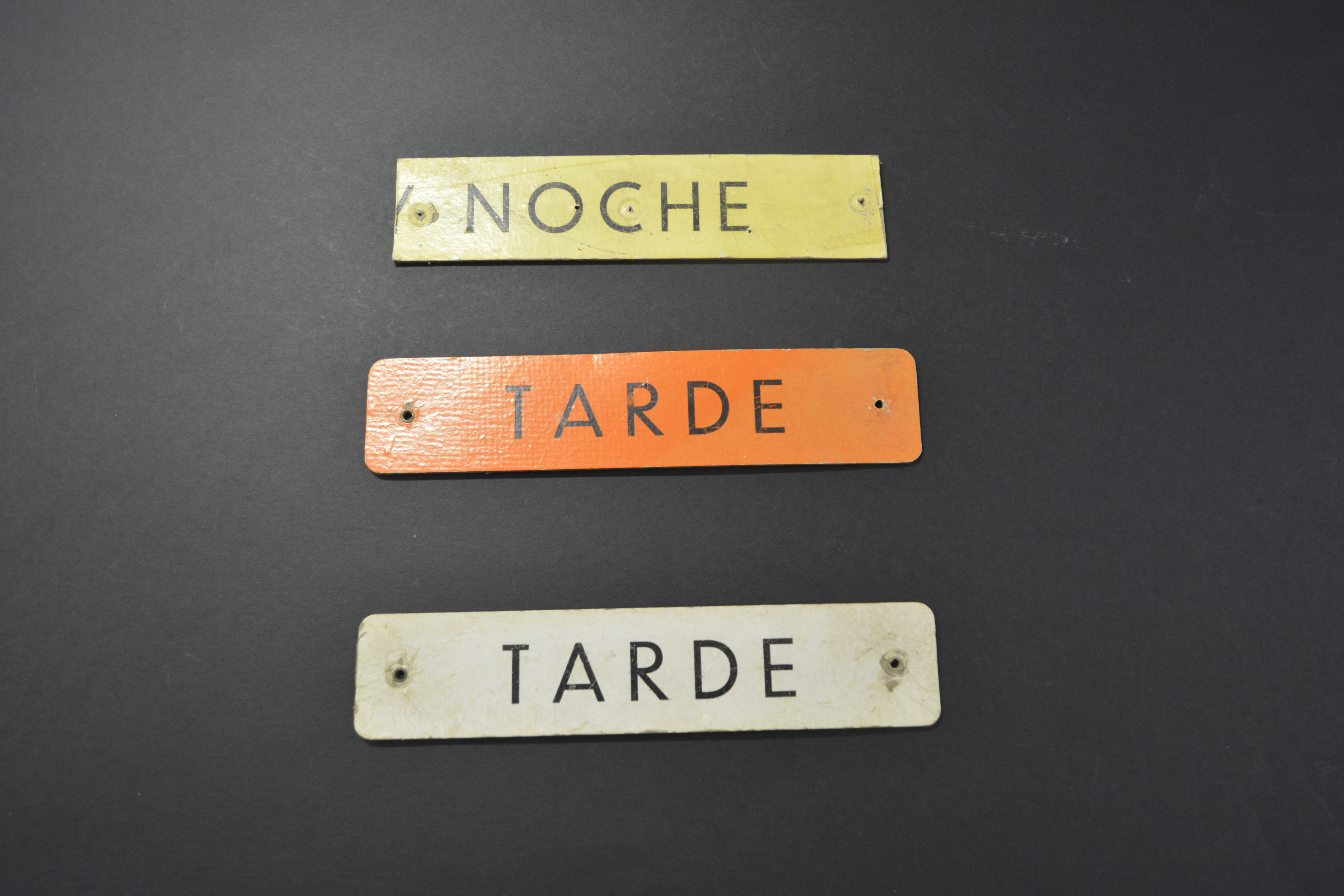 Imatge dels cartell d'avís del Cine Victòria (fons Círculo Mercantil - Arxiu Municipal de Palafrugell)